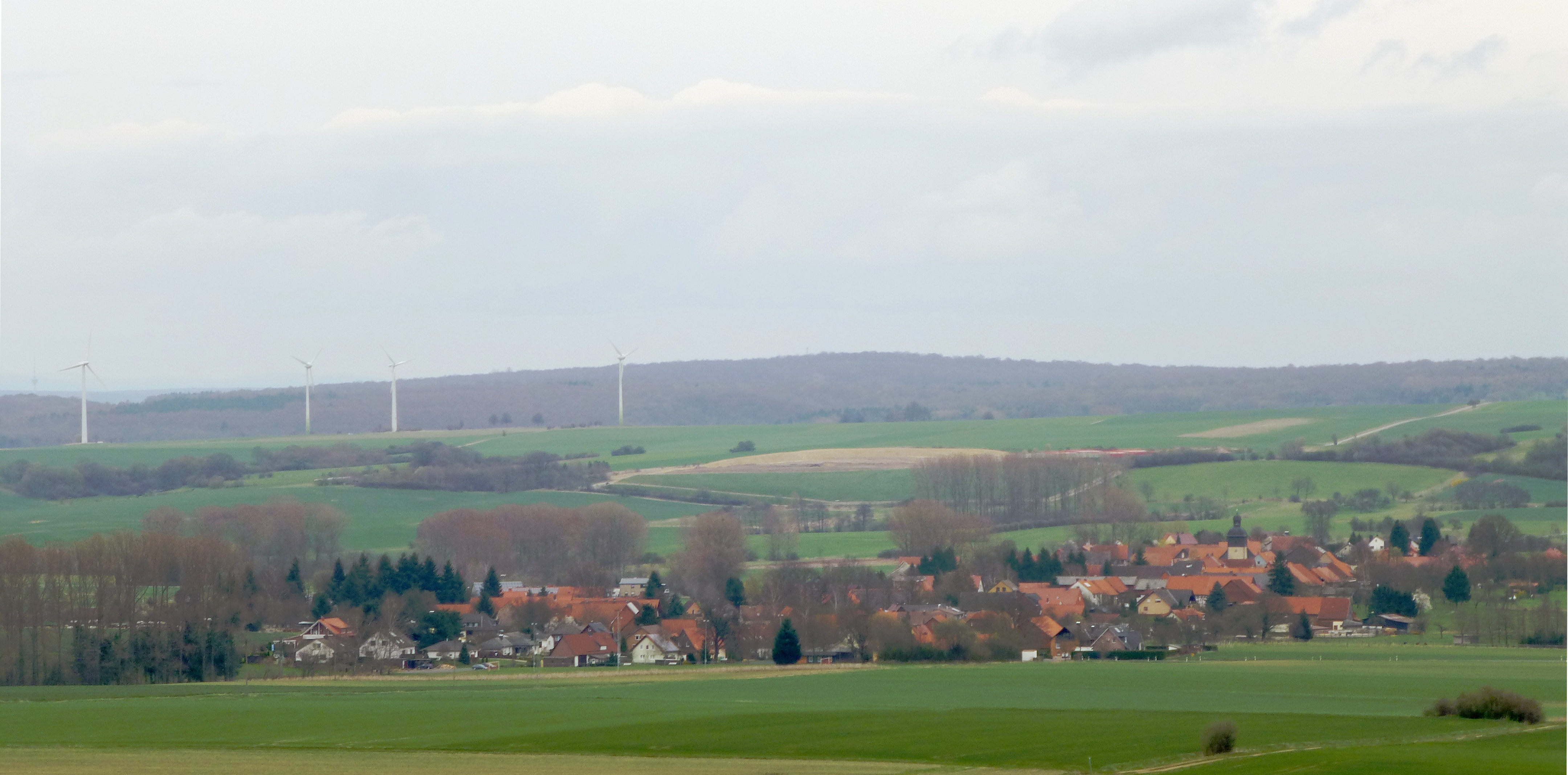 Blick von Westsüdwesten über Varlosen, Gemeinde Niemetal, Südniedersachsen